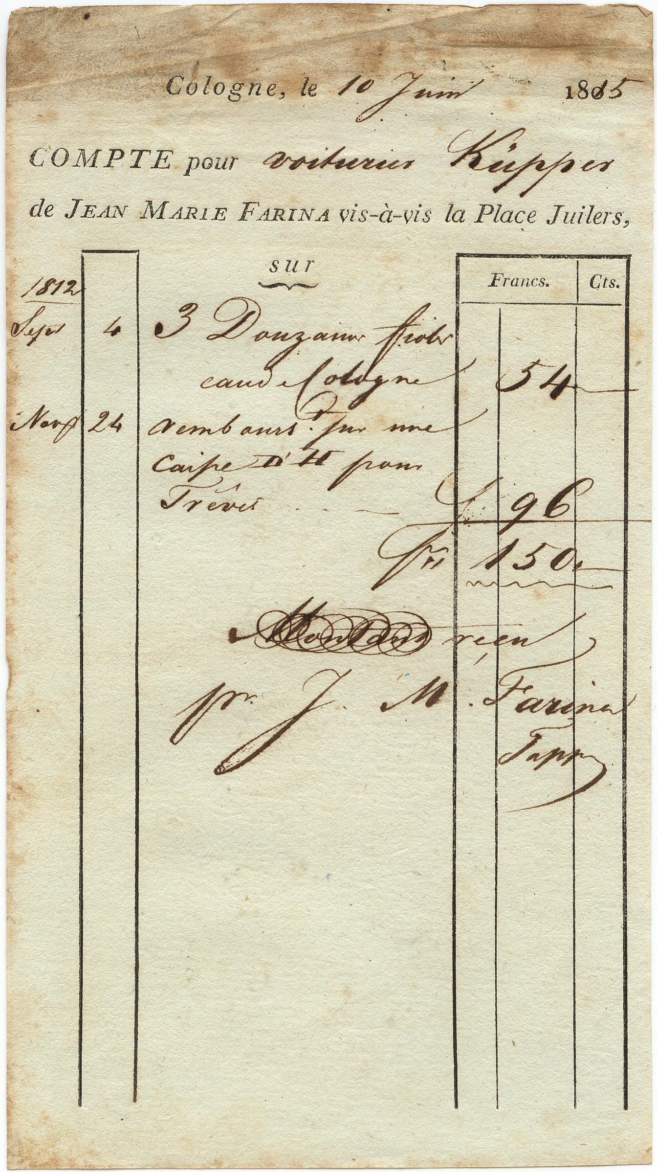 Farina Invoice 1815